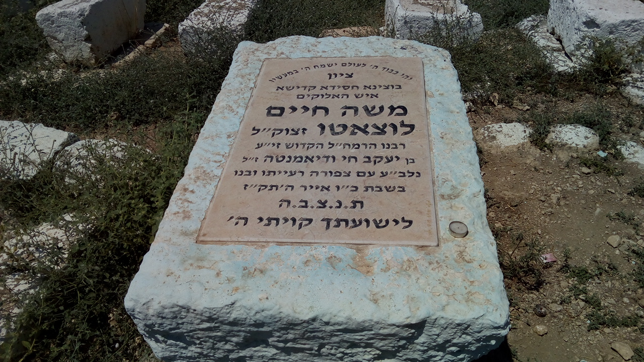 מצבת קבורת הרמח"ל בבית הקברות היהודי העתיק בכפר יאסיף